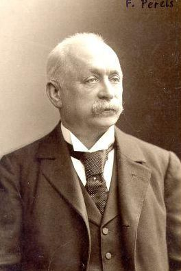 Porträtfotografie von Ferdinand Perels (1836-1903)